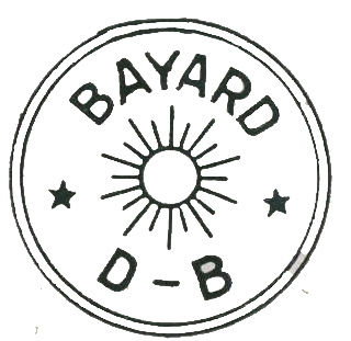 Logo Bayard utilisé de 1928 à 1953 environ sur les platines de réveil, collection musée de l'horlogerie Saint-Nicolas d'Aliermont